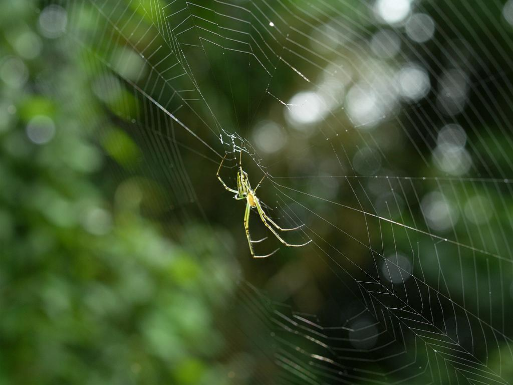 2008/08/08 和歌山県田辺市：Tanabe City. Wakayama Pref. Japan